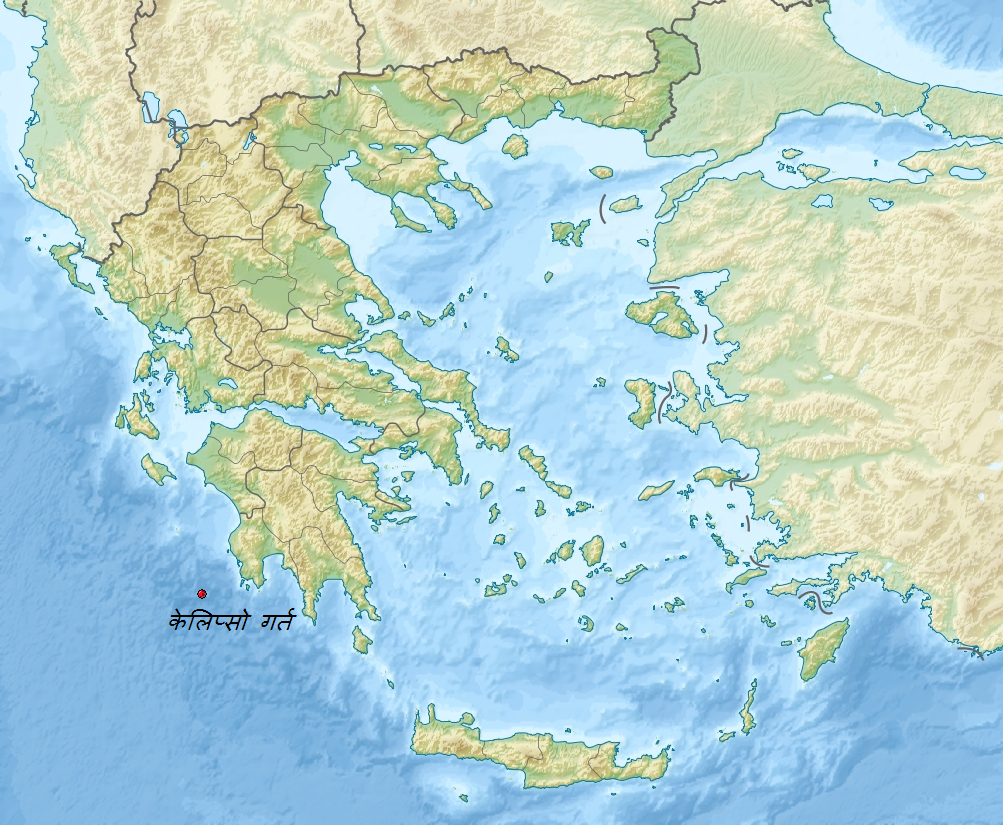 Calypso deep